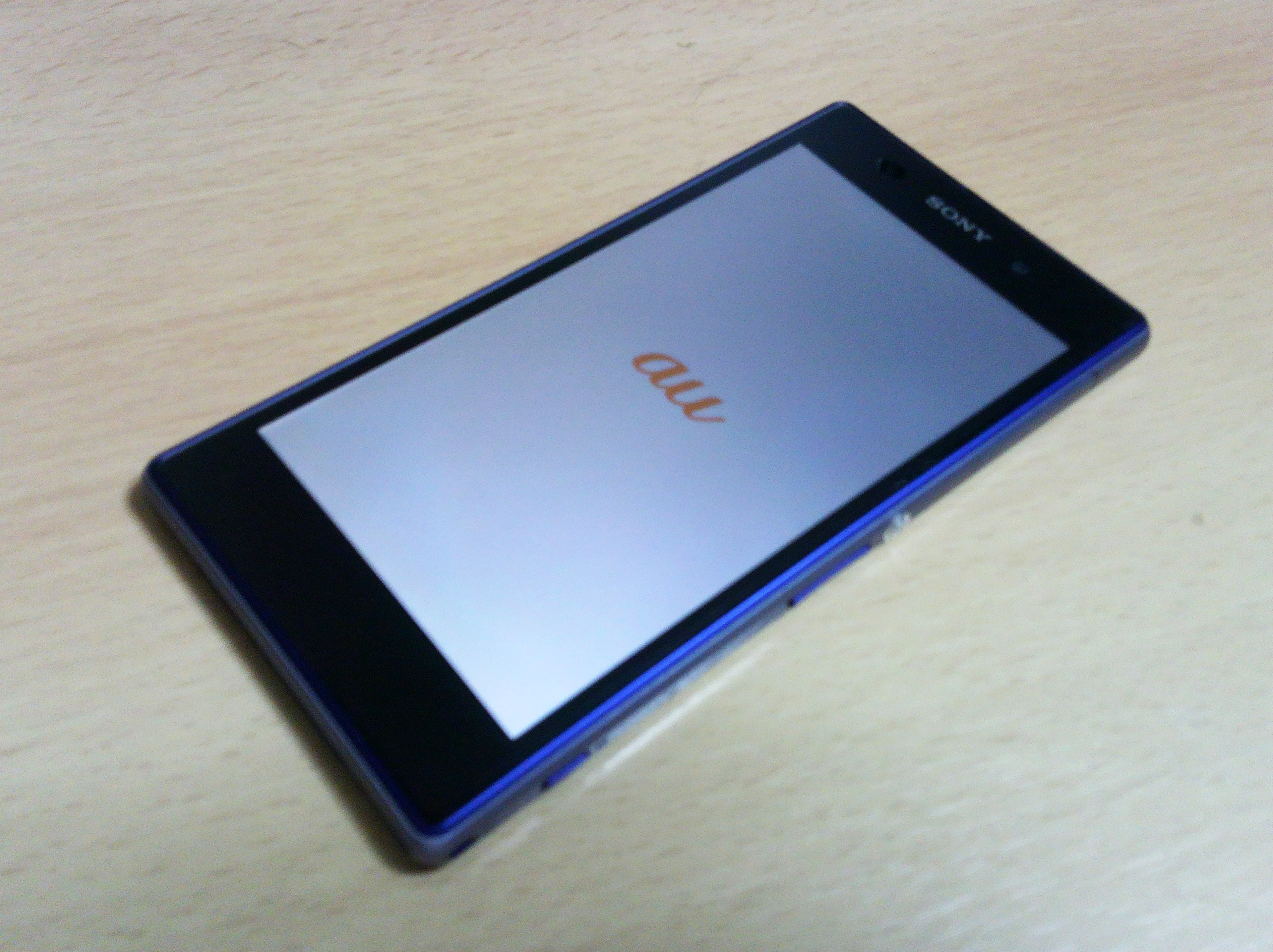 SOL23表側 以前のが削除されたのでトップ画面ではなく、起動時のauロゴで代用。